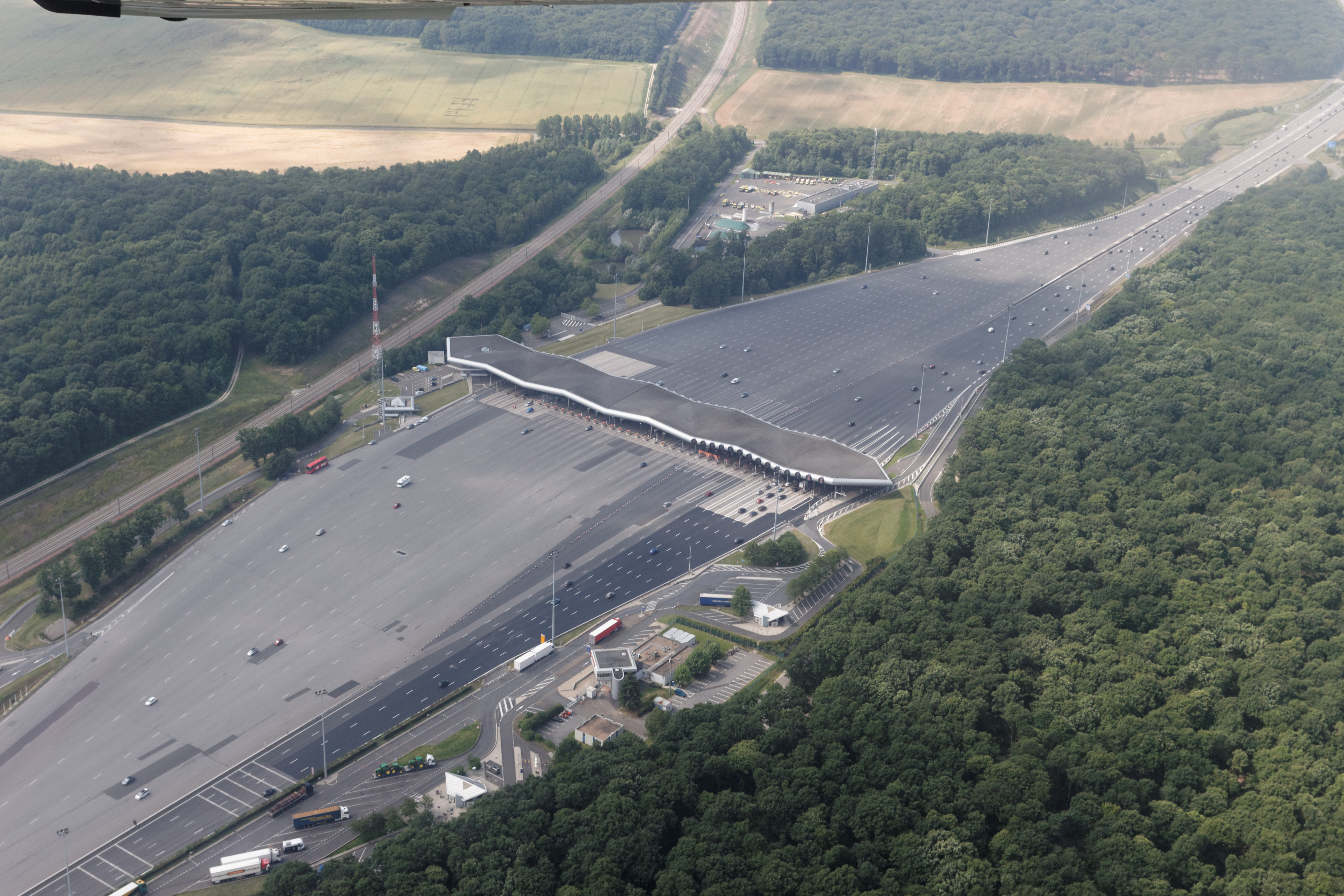 Péage de Saint-Arnoult-en-Yvelines, France.